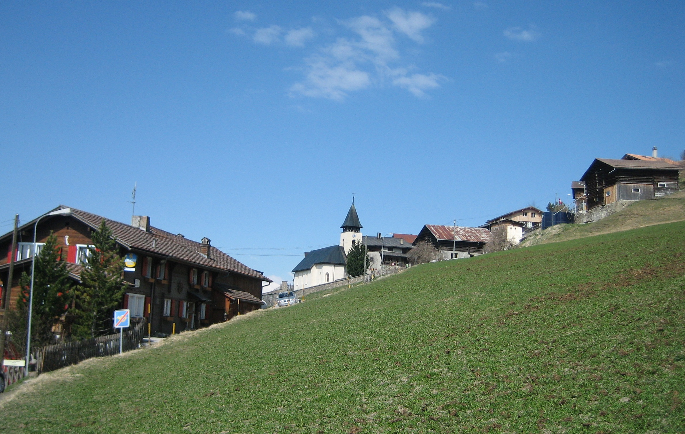 Trans, Dorf in der Gemeinde Tumegl/Tomils